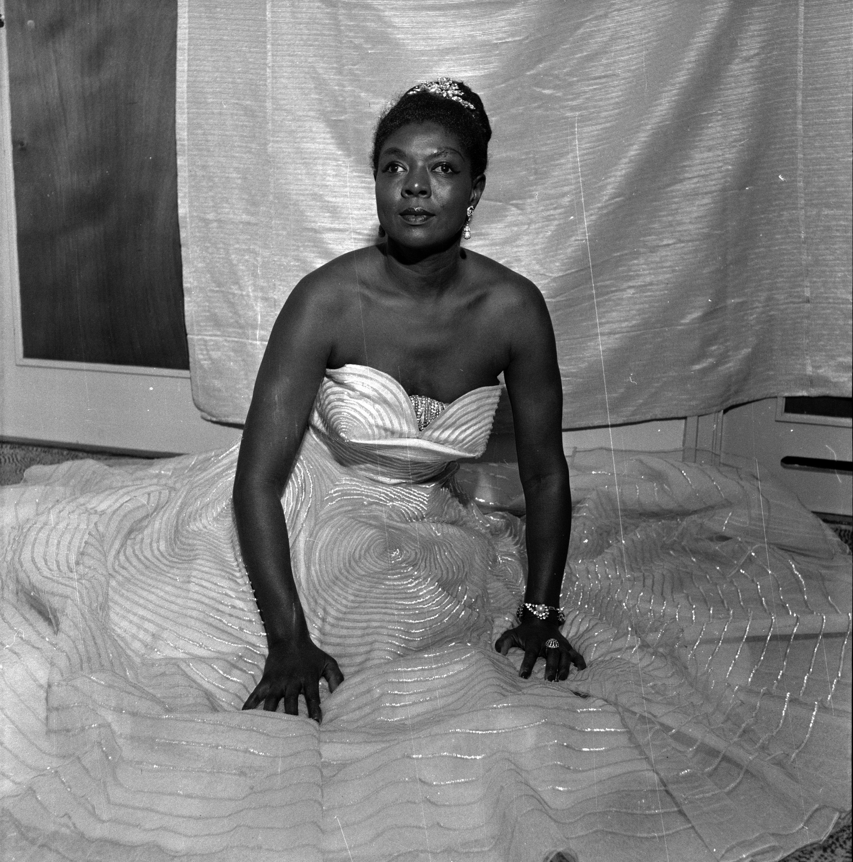 Sangeren Ruth Reese.